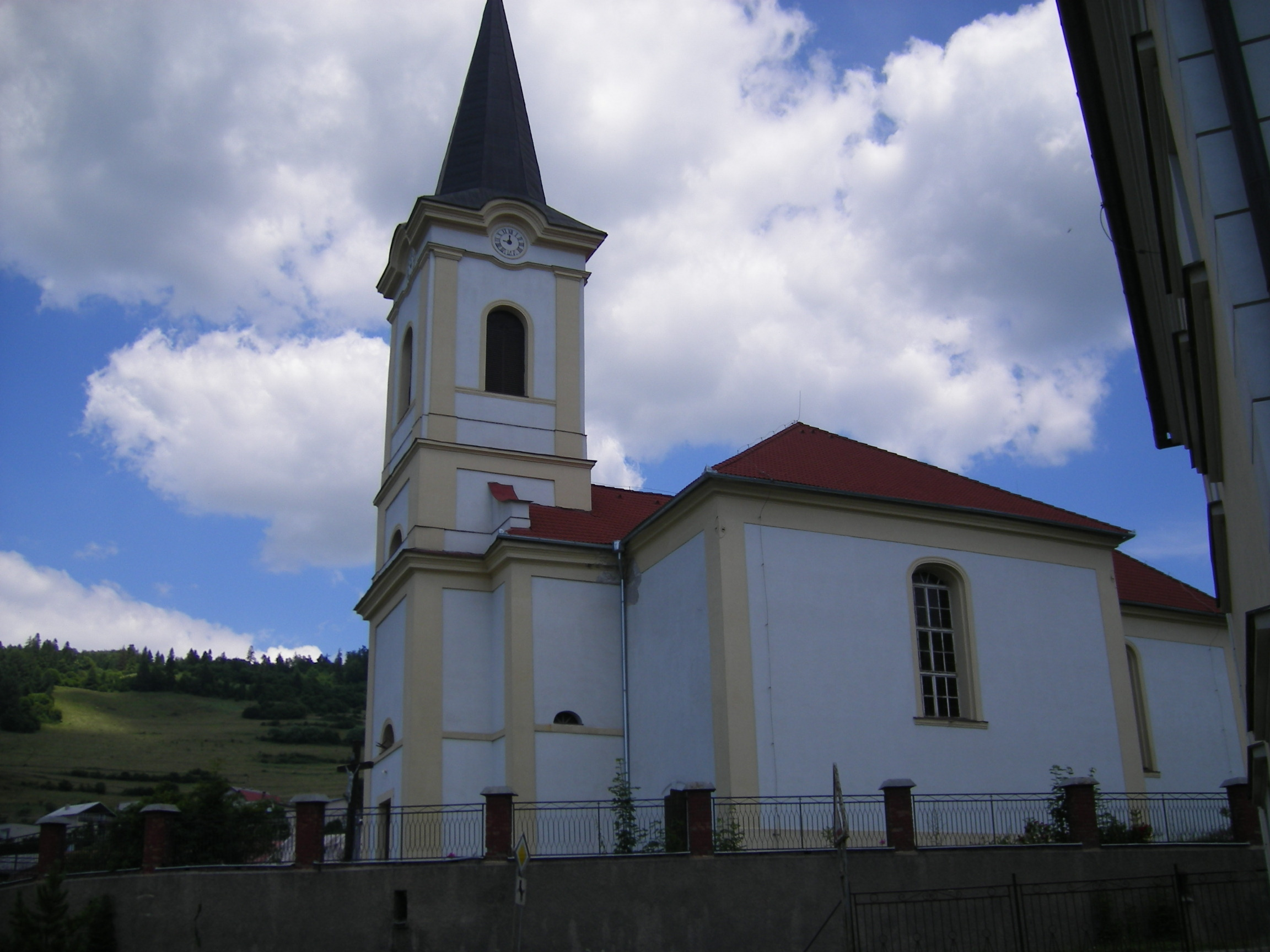 Nálepkovo (GL), catholic church